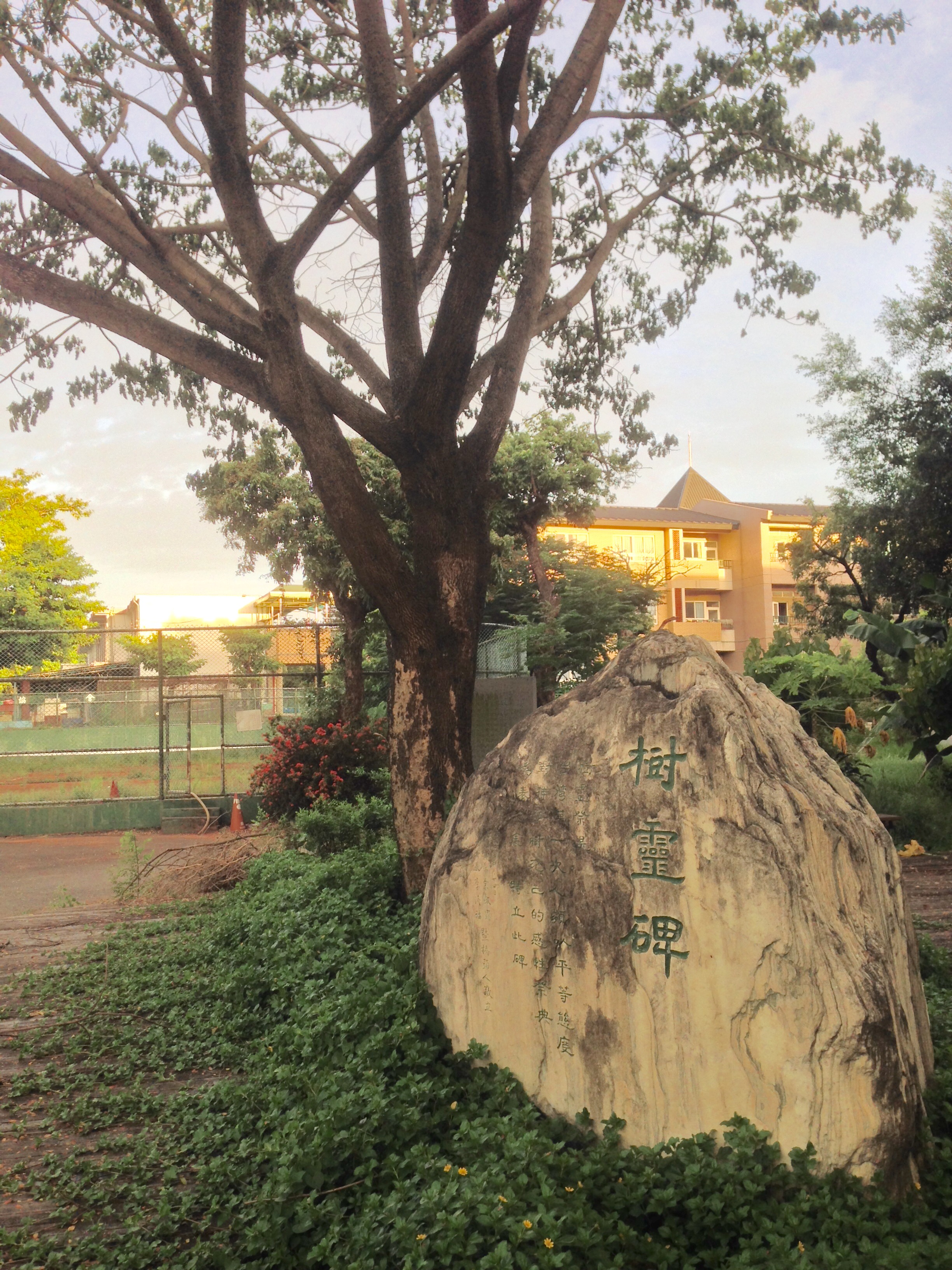 中文（台灣）: 樹靈碑與網球場